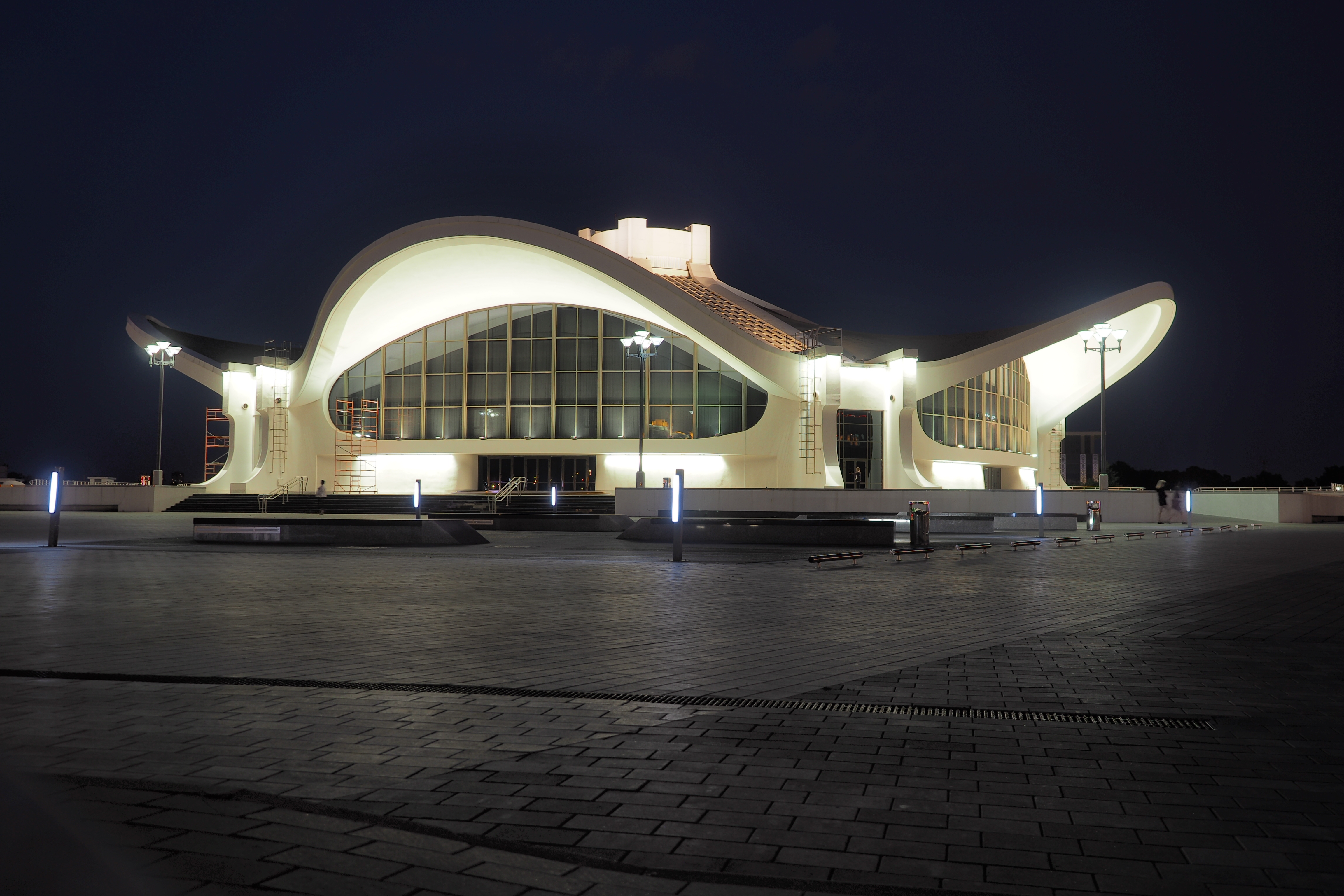 Minsk, Belarus